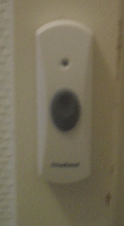 Ring ring